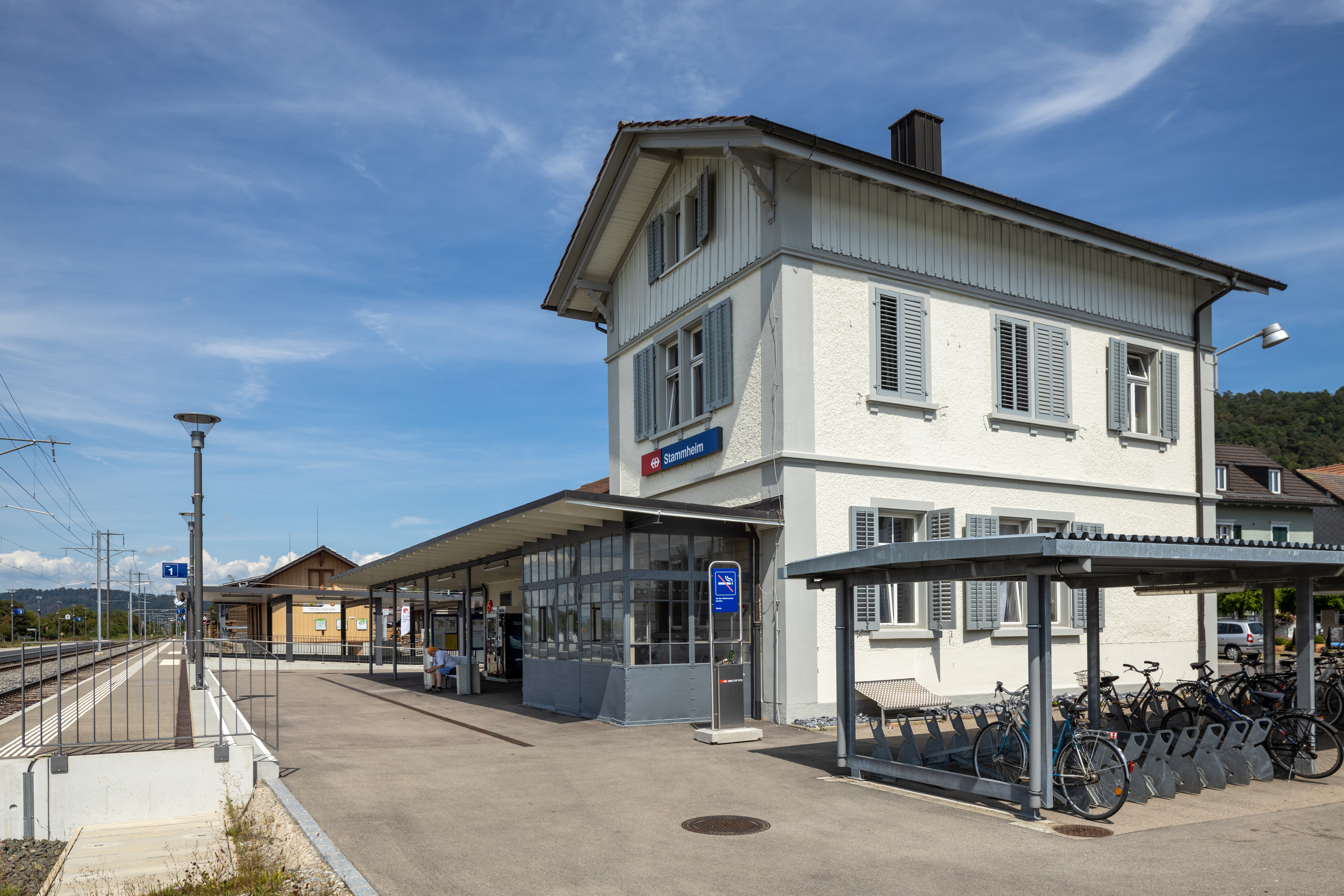 Bahnhof Stammheim, Aufnahmegebäude